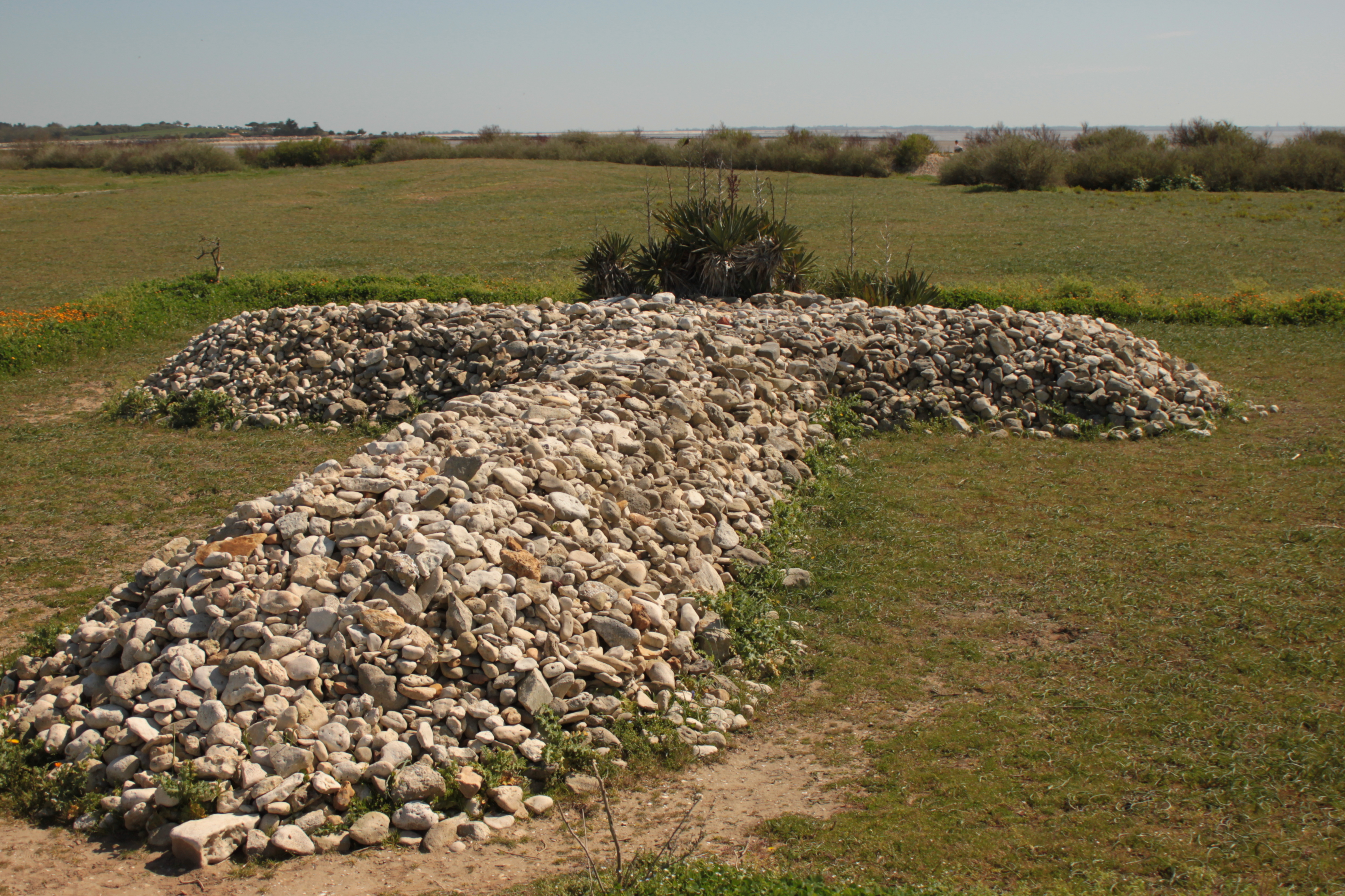 Croix de galets, hommage aux prêtres réfractaires, Fr-17-Île Madame.